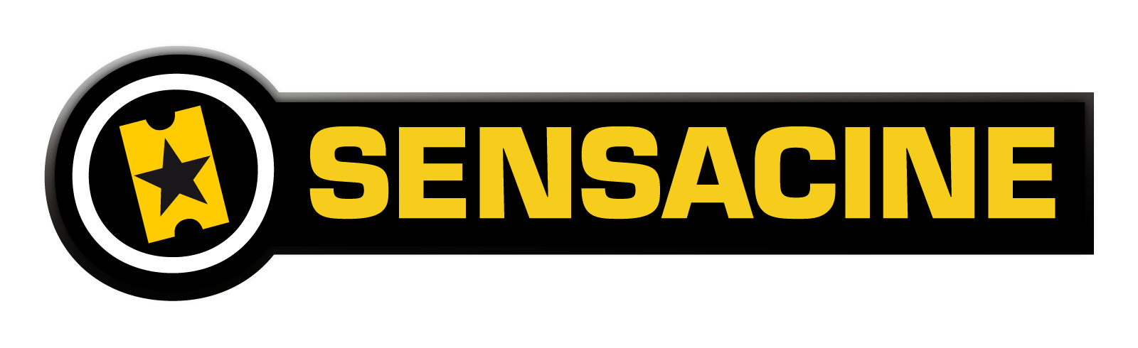 El logotipo de SensaCine.